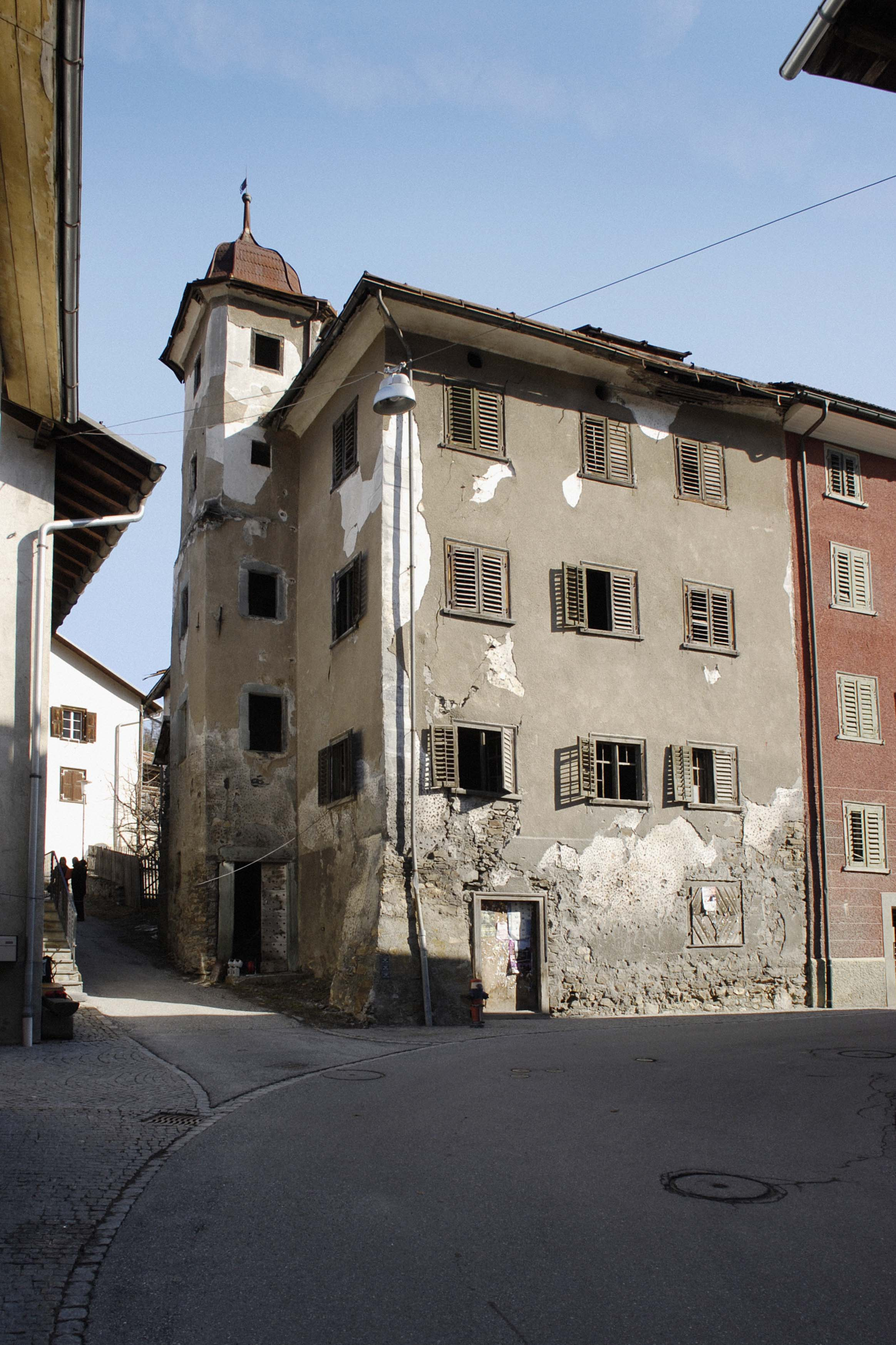 Türalihus vor der Restaurierung 2006